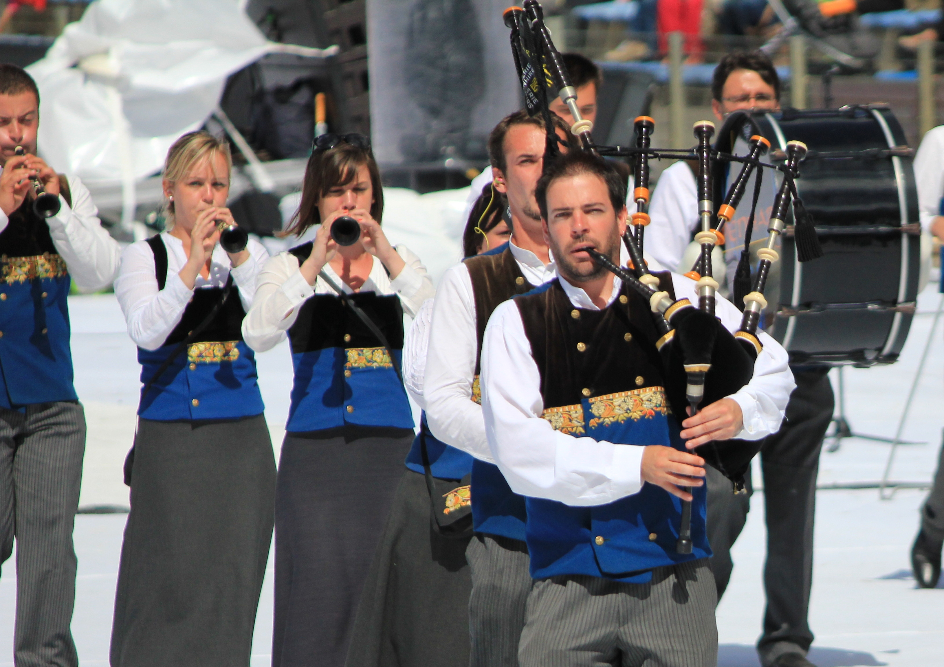 Bagad Penhars pendant le FIL 2012